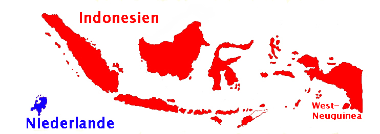 Größenvergleich zwischen den Niederlanden (blau) und ihrer ehemaligen Kolonie Indonesien (rot)